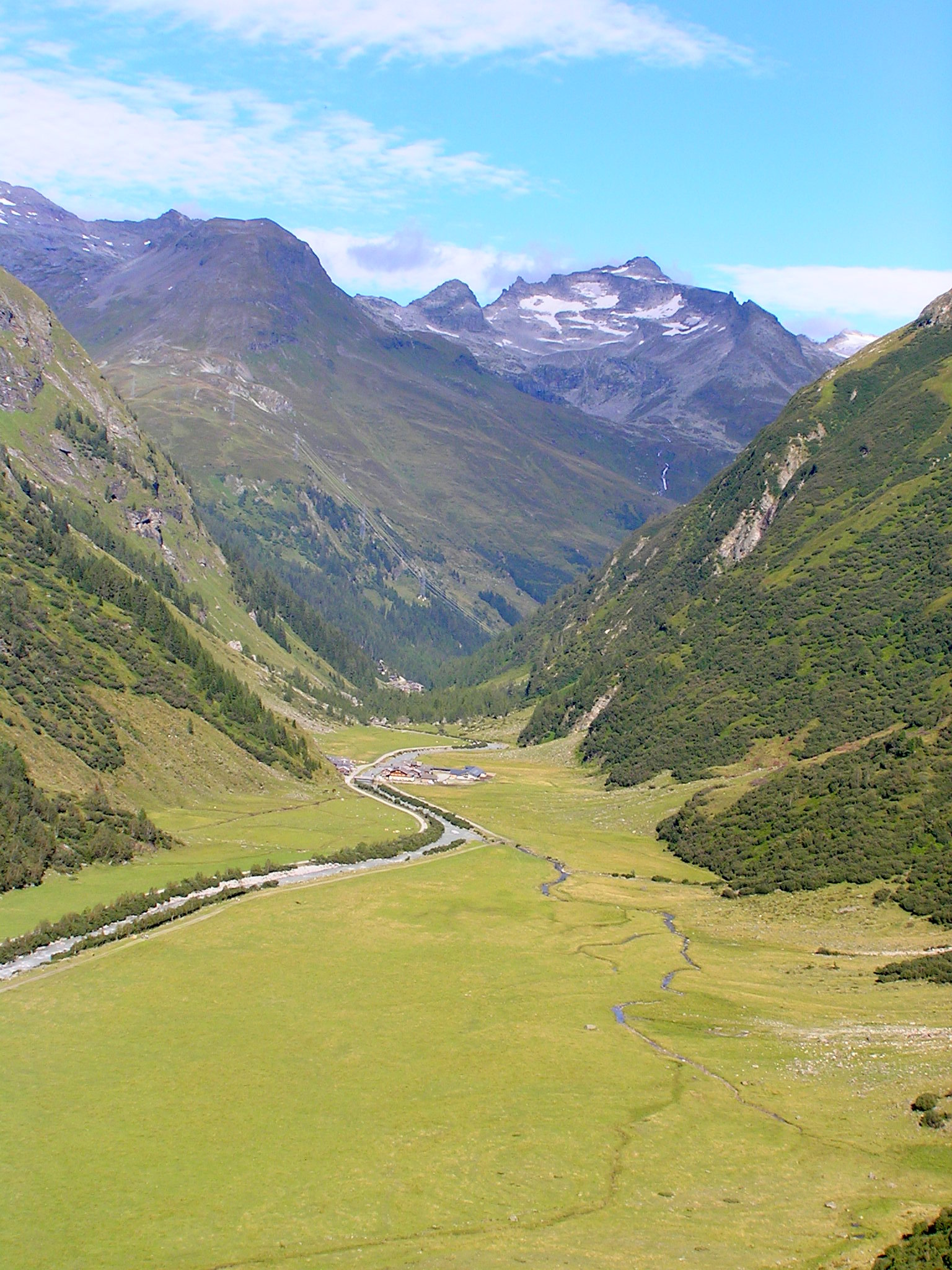 Das Tal des Gschlößbaches in den Hohen Tauern